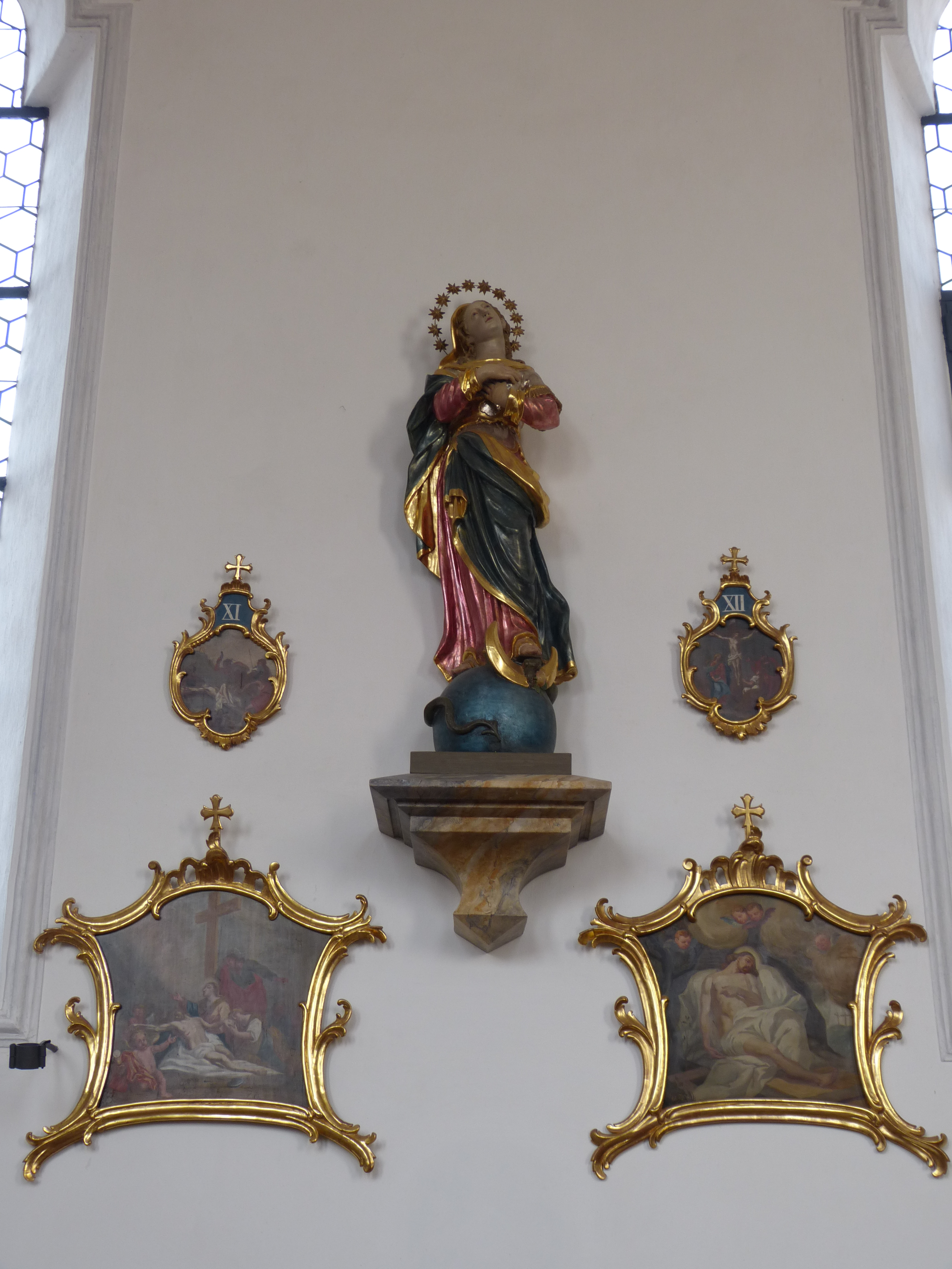 St. Gordian und Epimachus, Frechenrieden, Gemeinde Markt Rettenbach, Landkreis Unterallgäu, Bayern